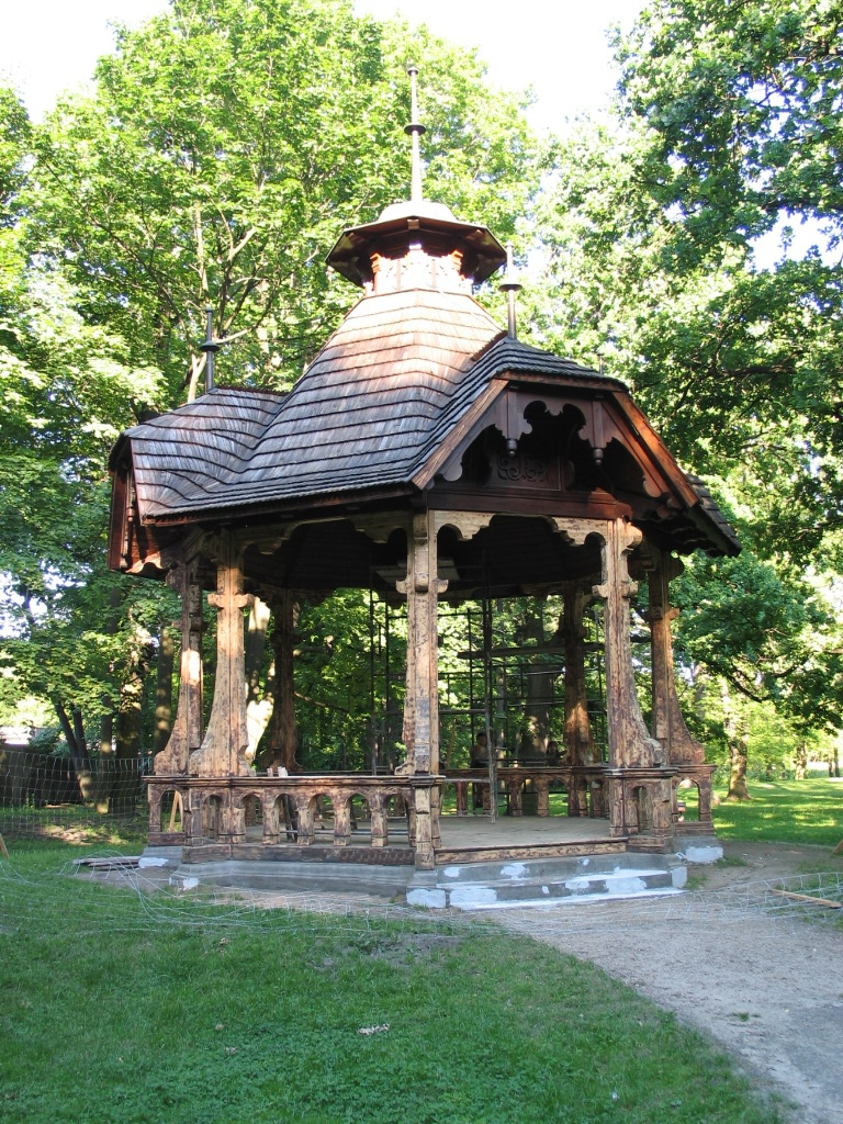 Park Źródliska Łódź